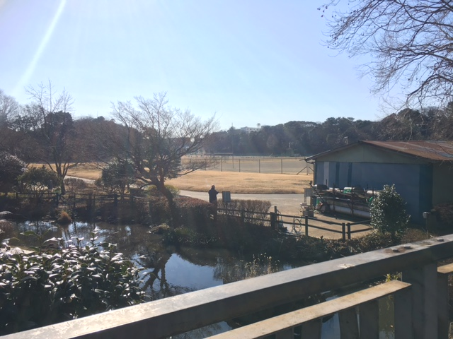 2017年1月24日